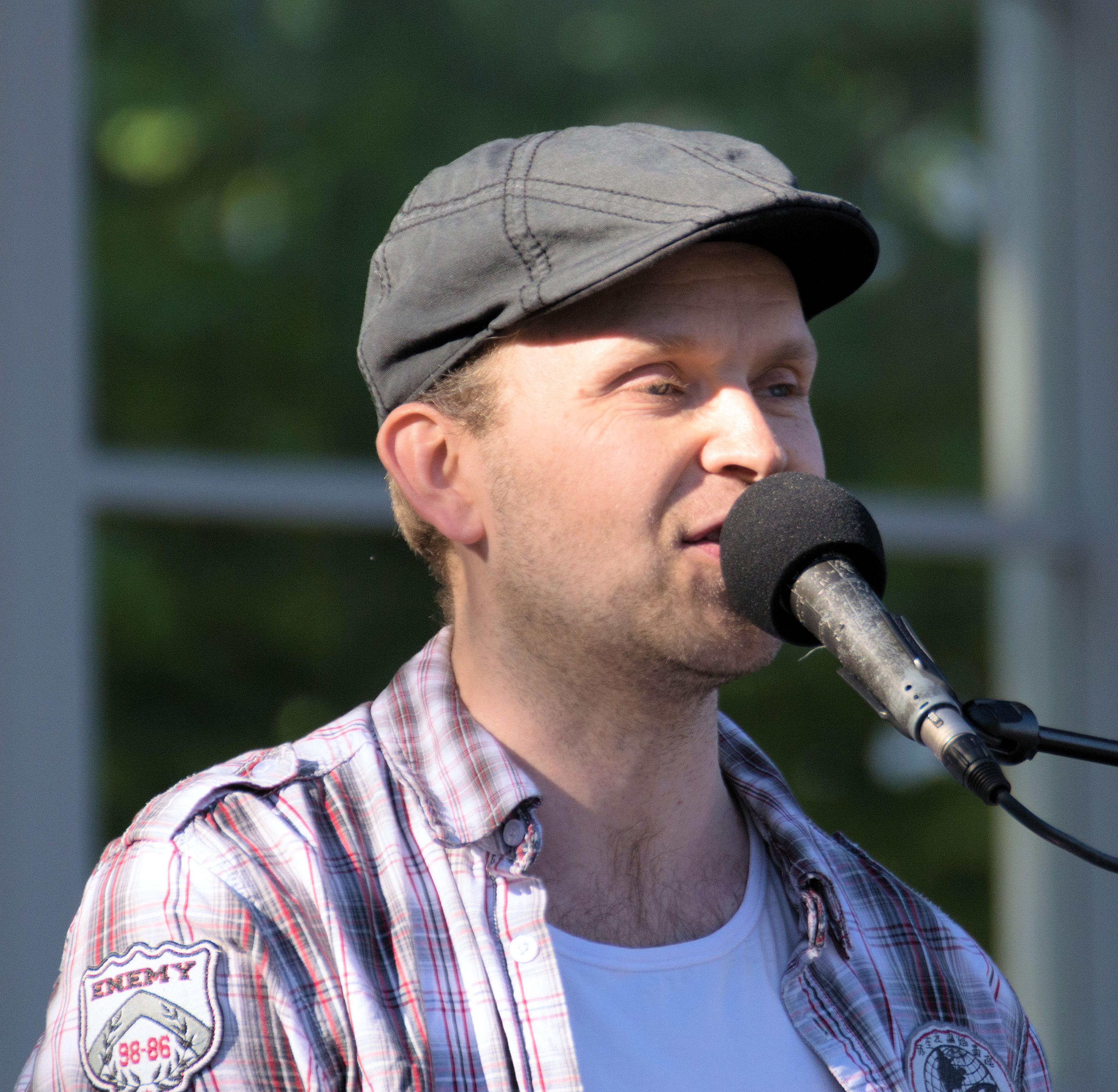 Antti Kleemola suomalainen laulaja